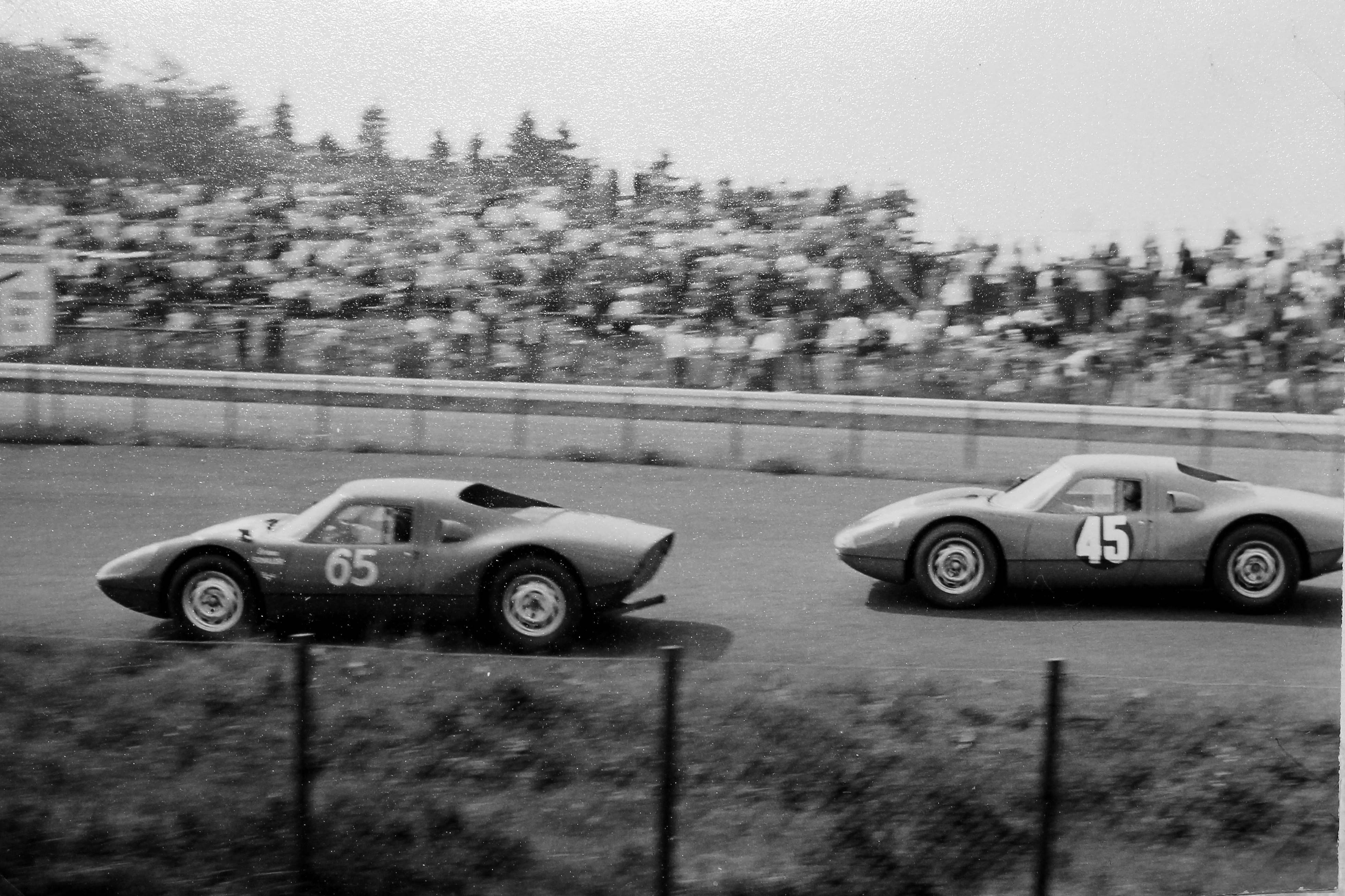 Porsche 904 von Joseph Siffert/Schiller und Ben Pon/Gerhard Koch beim 1000-km-Rennen auf dem Nürburgring eingangs Südkehre. Der Fahrer im Wagen nur 45 ist wahrscheinlich Ben Pon.